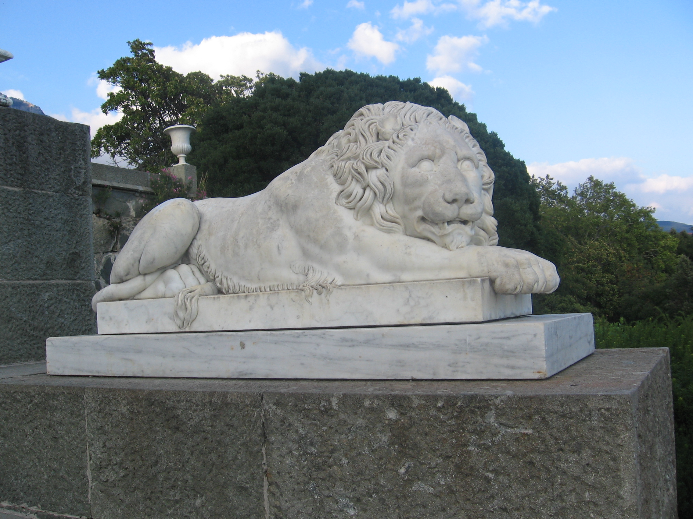 Крим, Алупкинський палац. Левова тераса, декоративна скульптура 19 ст.(ск. Бонанні ?)